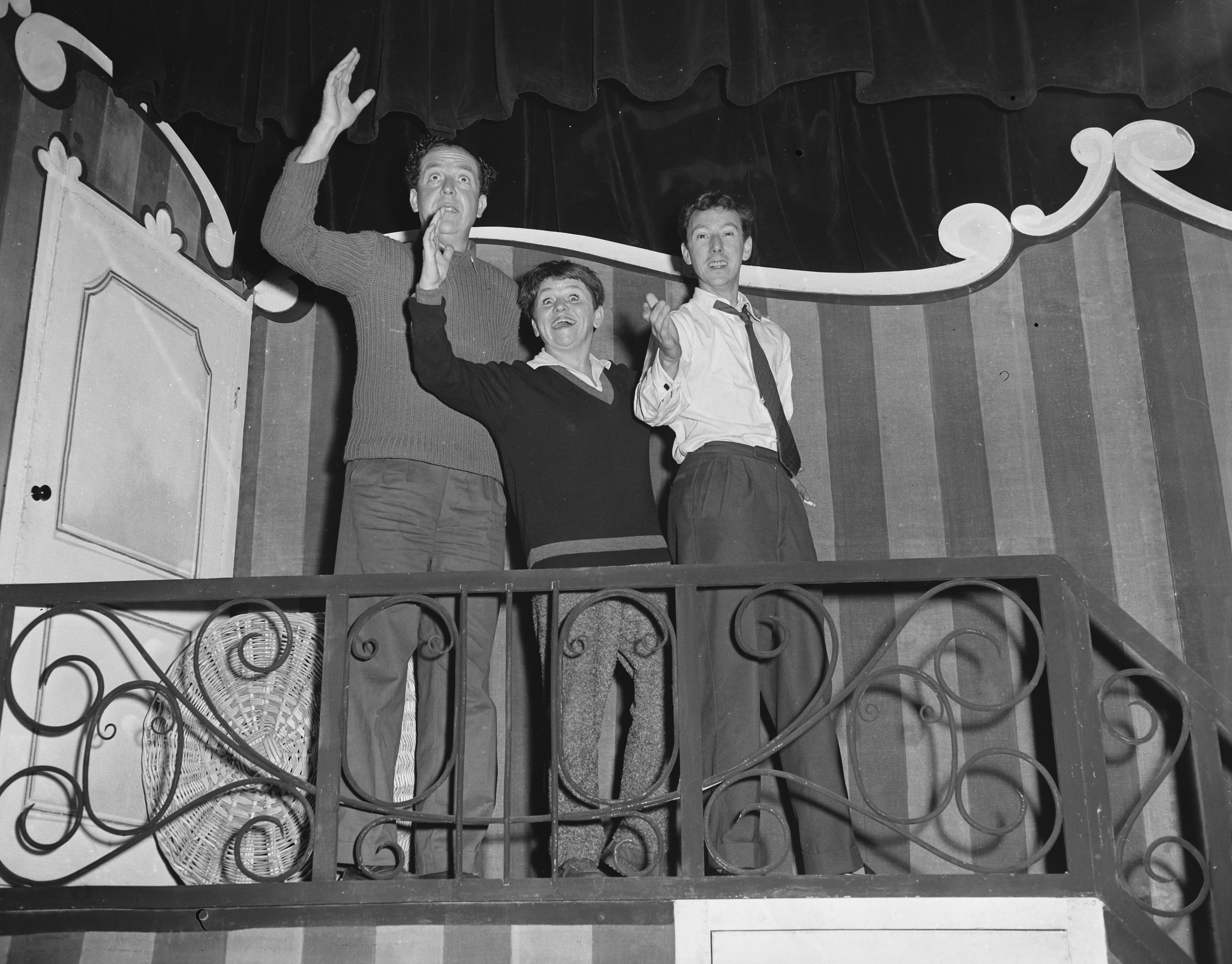 Collectie / Archief : Fotocollectie Anefo Reportage / Serie : [ onbekend ] Beschrijving : Premiere ABC Cabaret "De Kat van Huis" in Den Haag; Wim Kan, Corry Vonk, Albert Mol Datum : 29 juli 1955 Locatie : Den Haag, Zuid-Holland Trefwoorden : acteurs, cabaret, cabaretiers Persoonsnaam : Kan, Wim, Mol, Albert, Vonk, Corry Fotograaf : Pot, Harry / Anefo Auteursrechthebbende : Nationaal Archief Materiaalsoort : Negatief (zwart/wit) Nummer archiefinventaris : bekijk toegang 2.24.01.04 Bestanddeelnummer : 907-2571